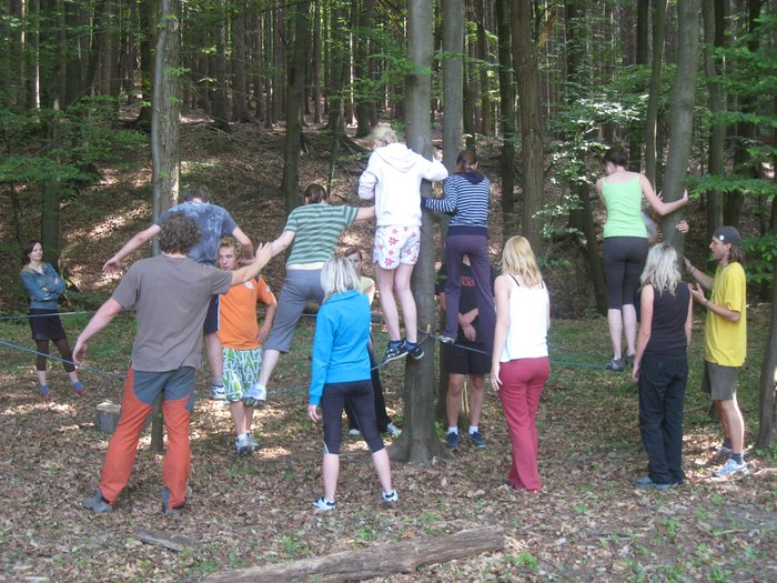 Česky: Gymnázium Ladislava Jaroše Holešov - Sportovní stacionář